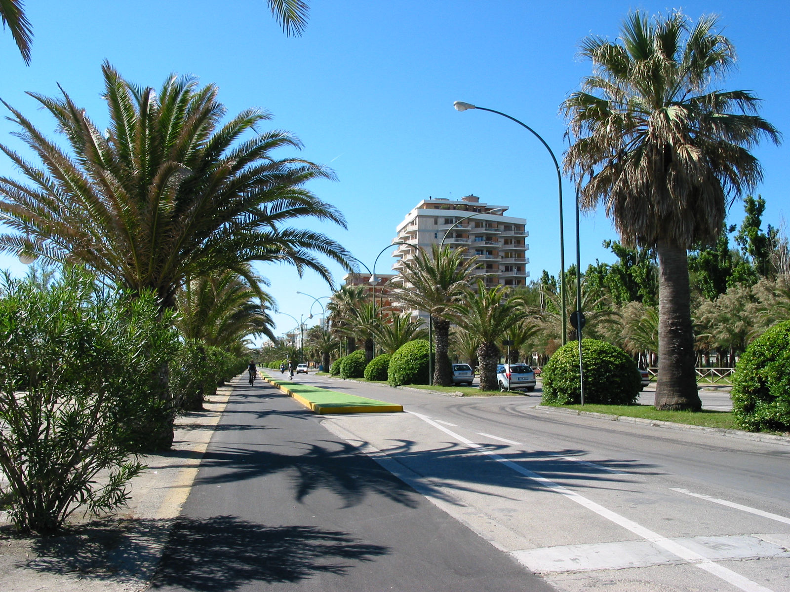 San Benedetto del Tronto, Marche, Italia